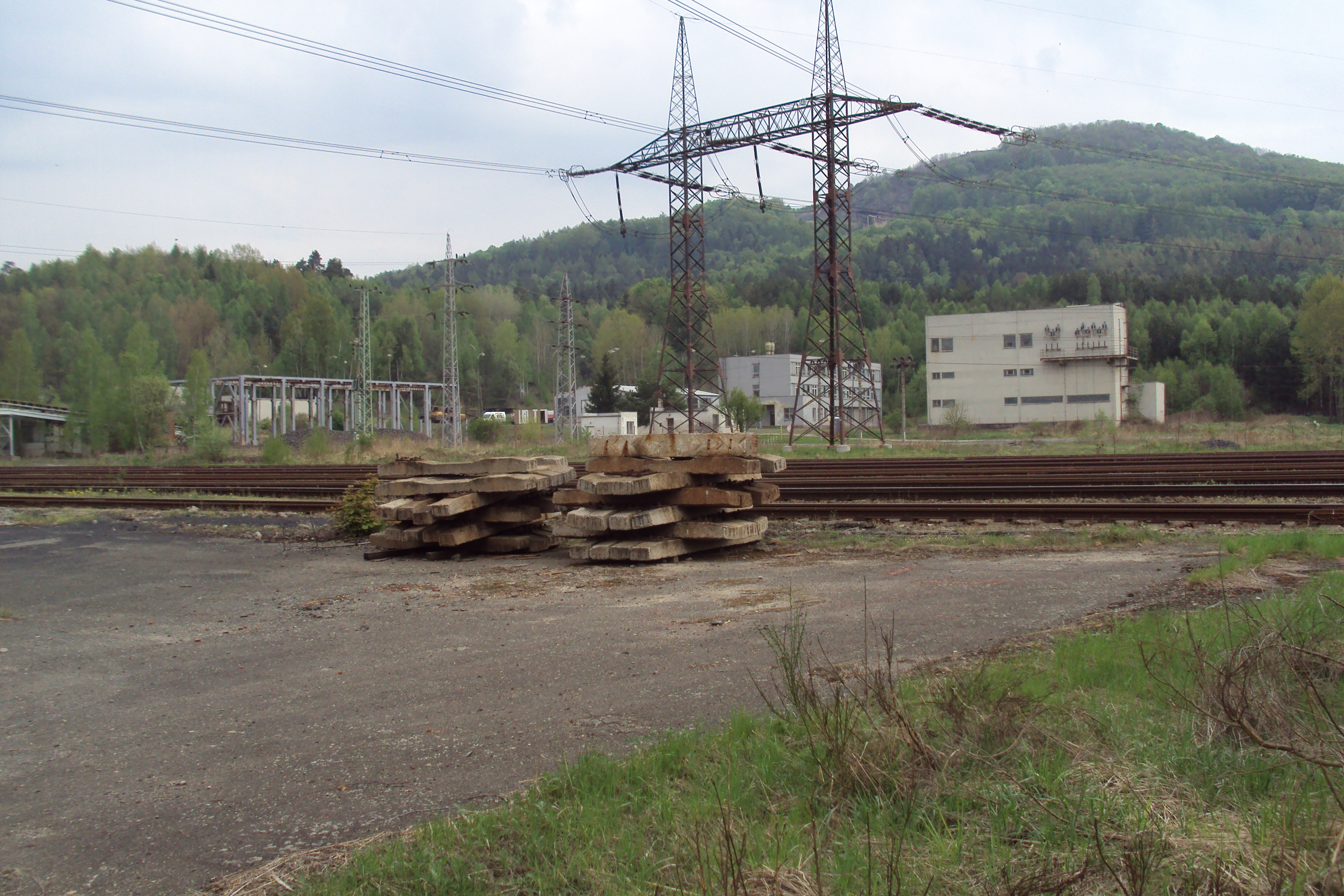 Kopec, pod ním budovy lomu, fotka od nádraží Brniště